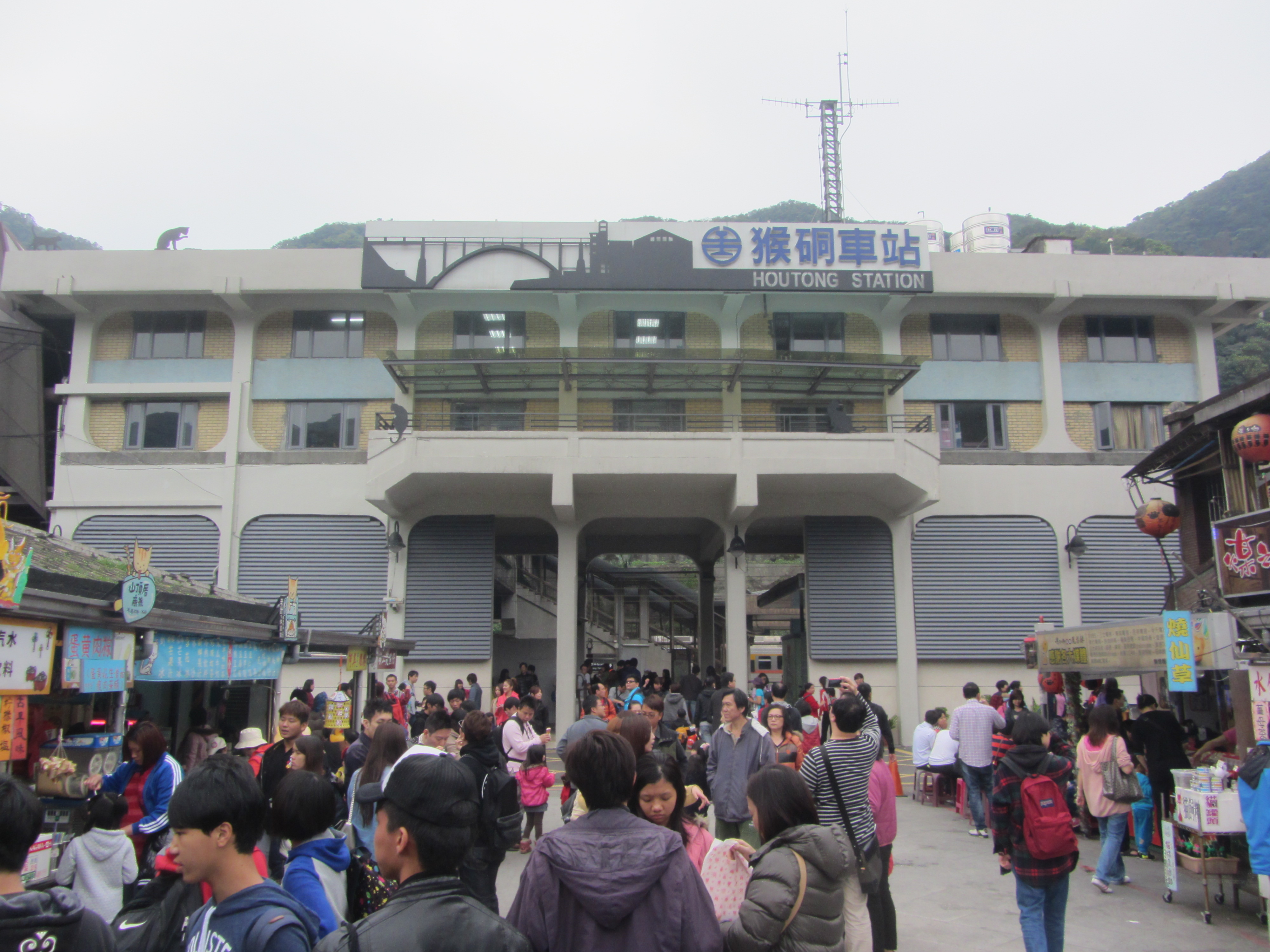 恢復舊名的臺灣鐵路管理局猴硐車站。